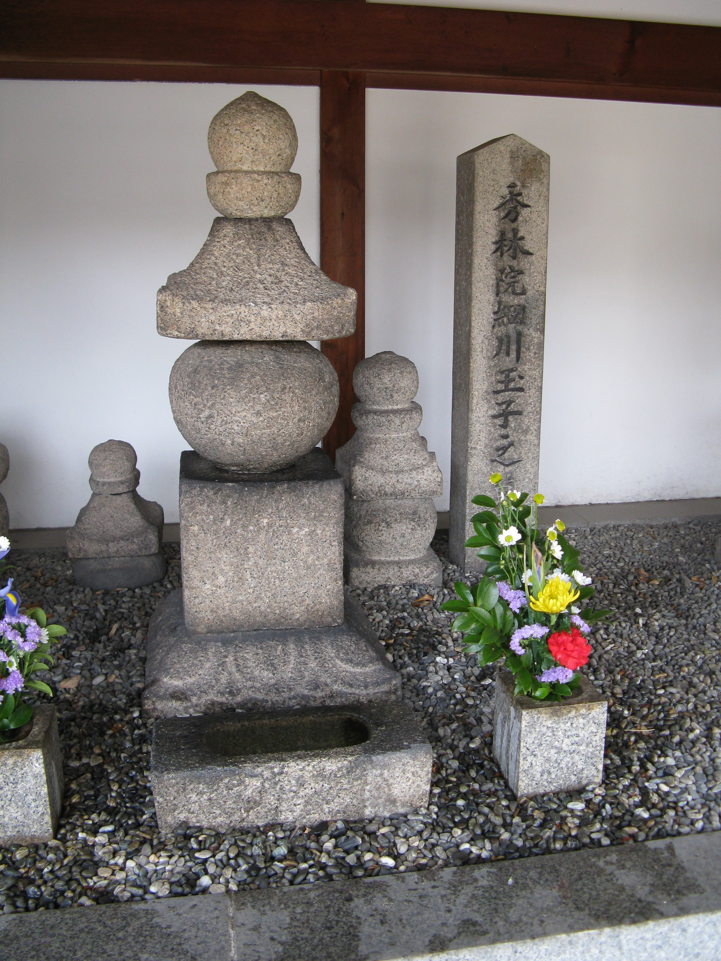 崇禅寺 細川ガラシャの墓